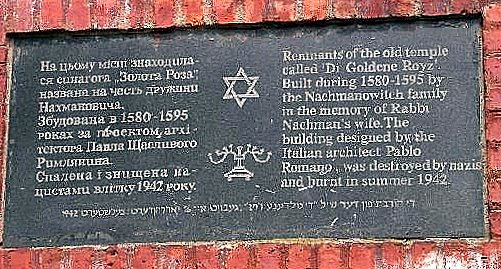 Золота Роза синагога у Львові